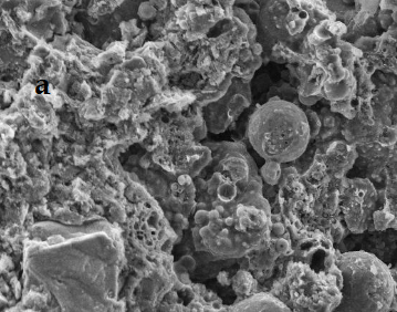 SEM micrographs original fly ash (a) NASH